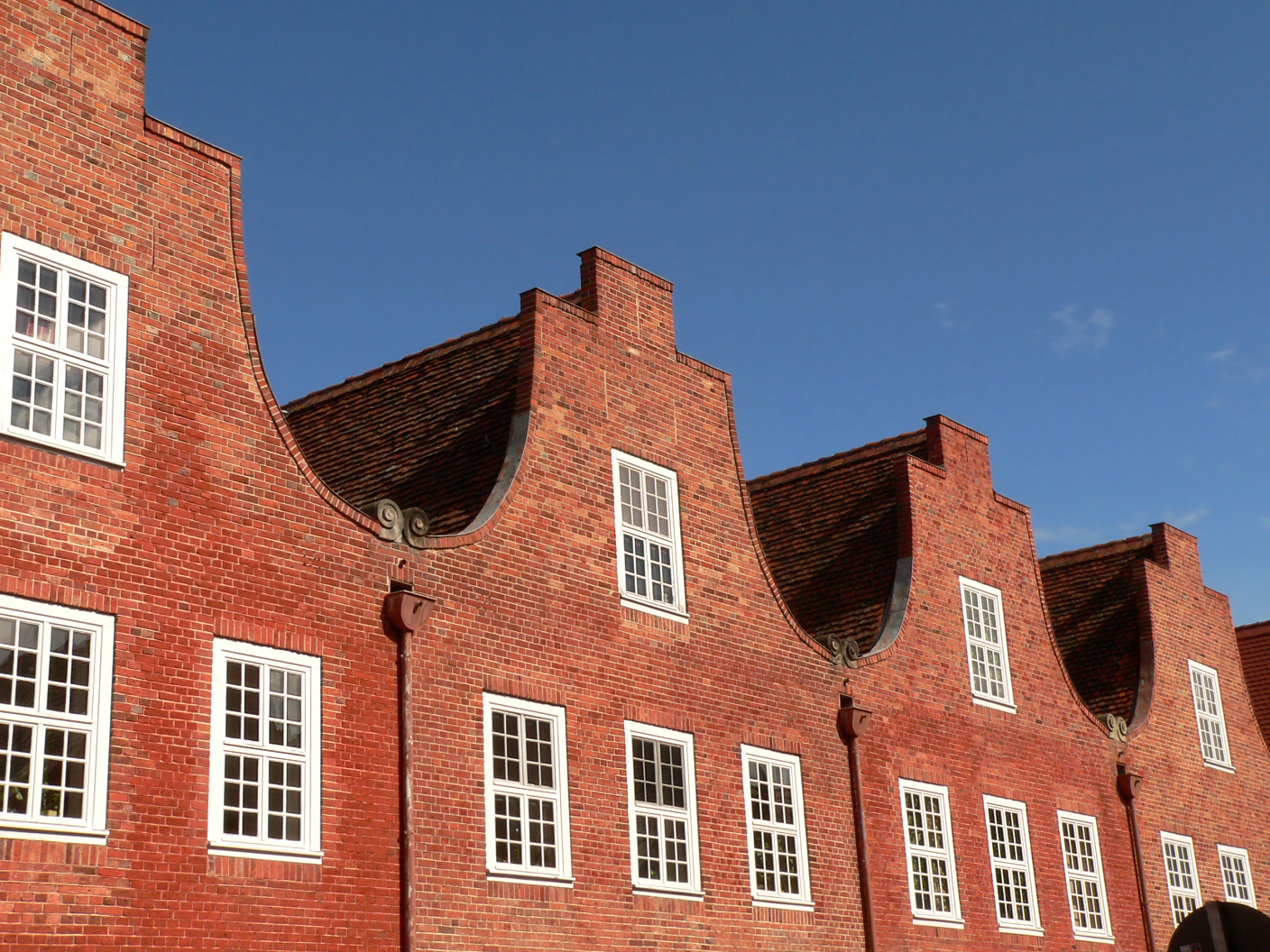 Holländisches Viertel (Potsdam)